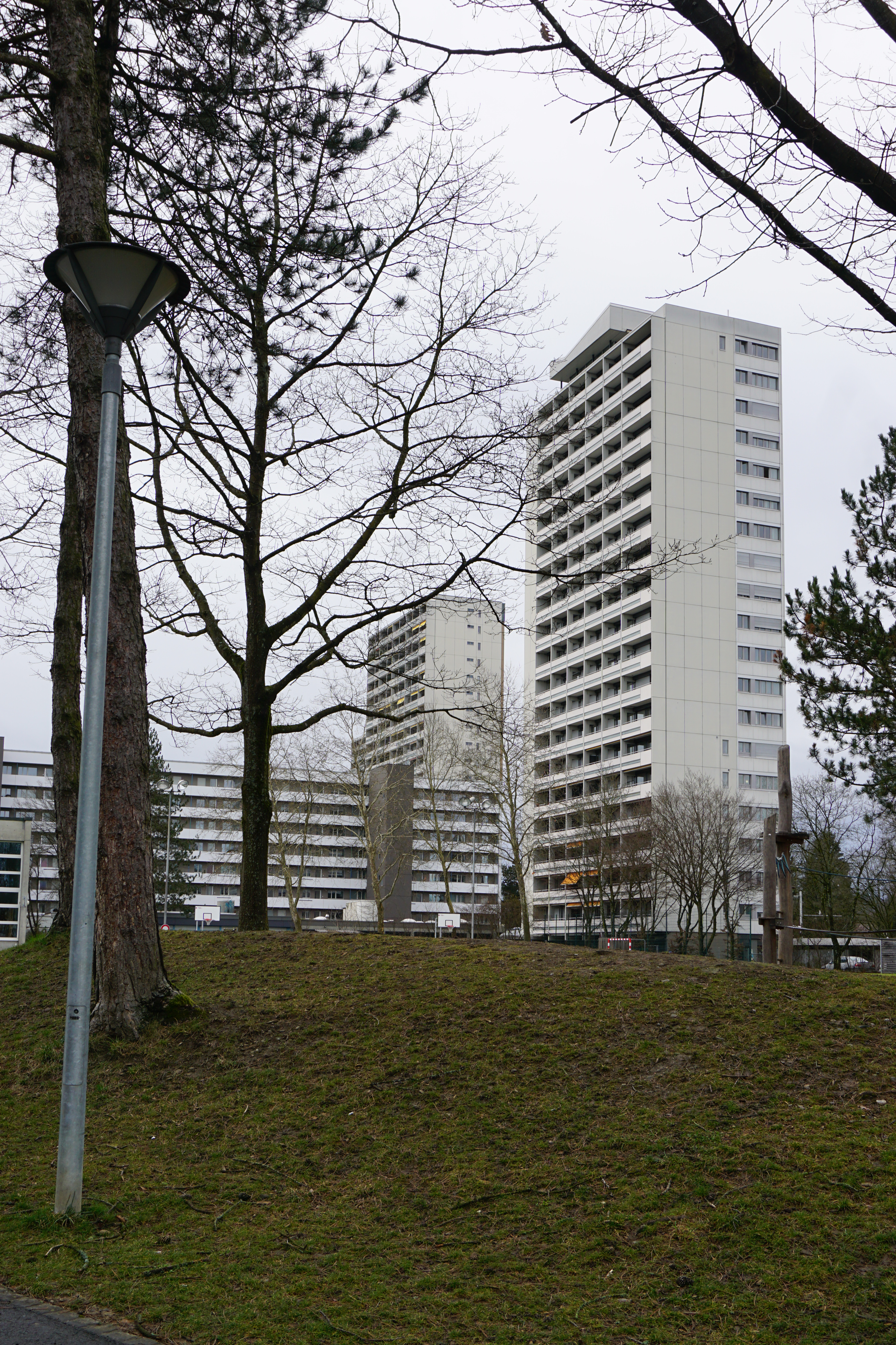 Tscharnergut Hochhäuser von Schulhausplatz